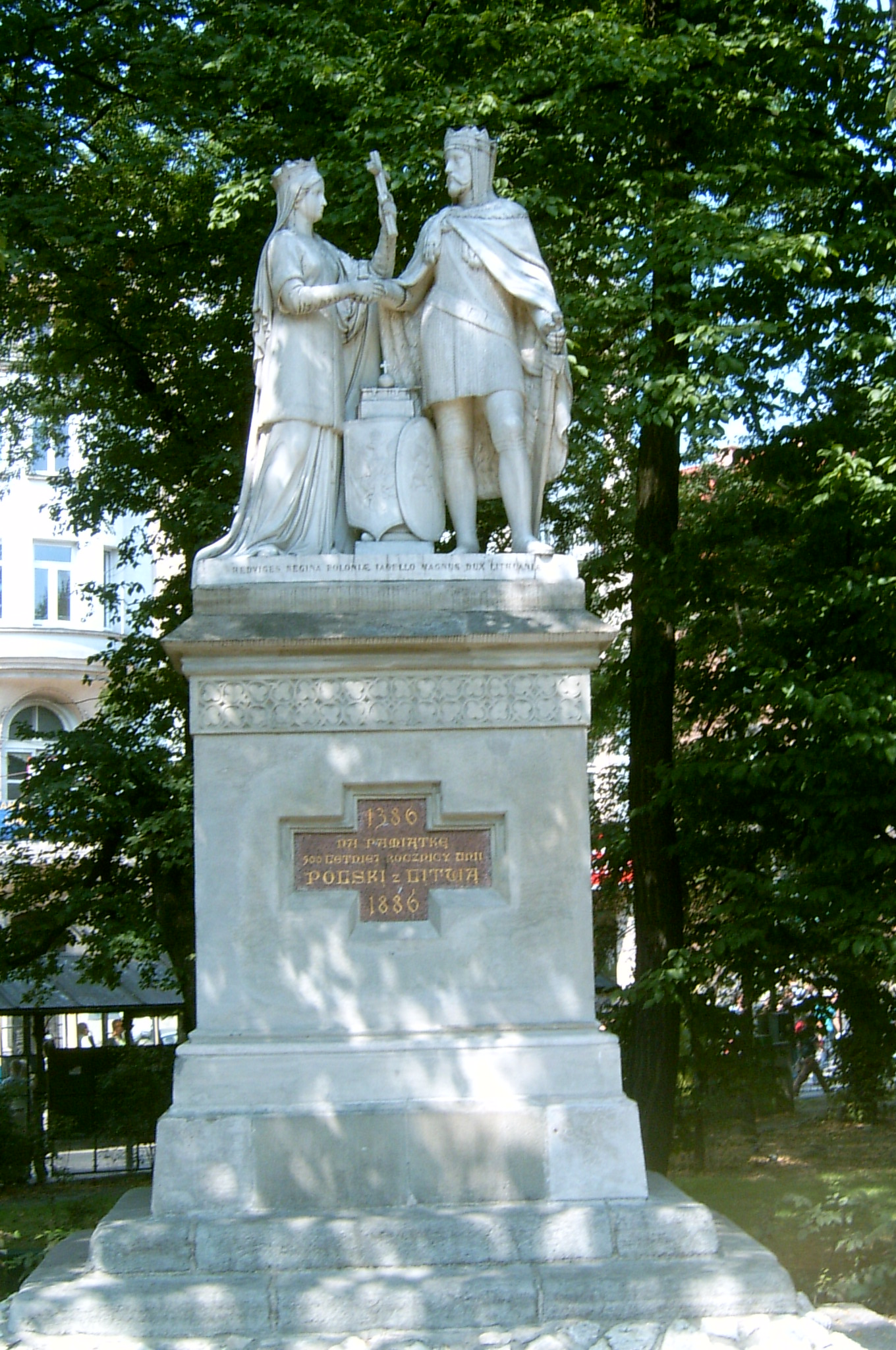 Planty in Kraków, Poland